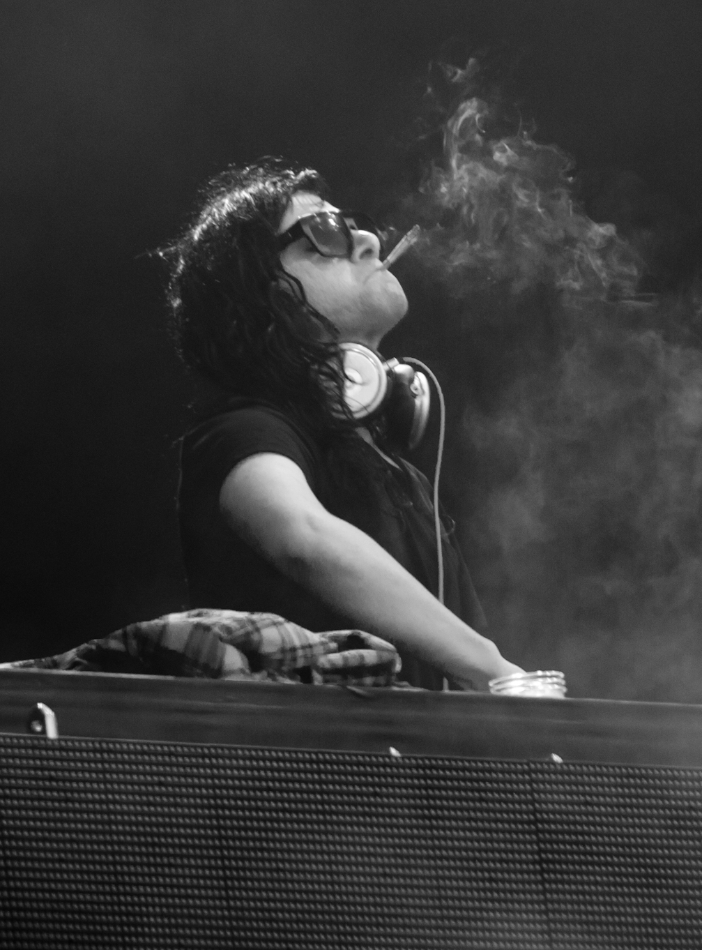 Skrillex